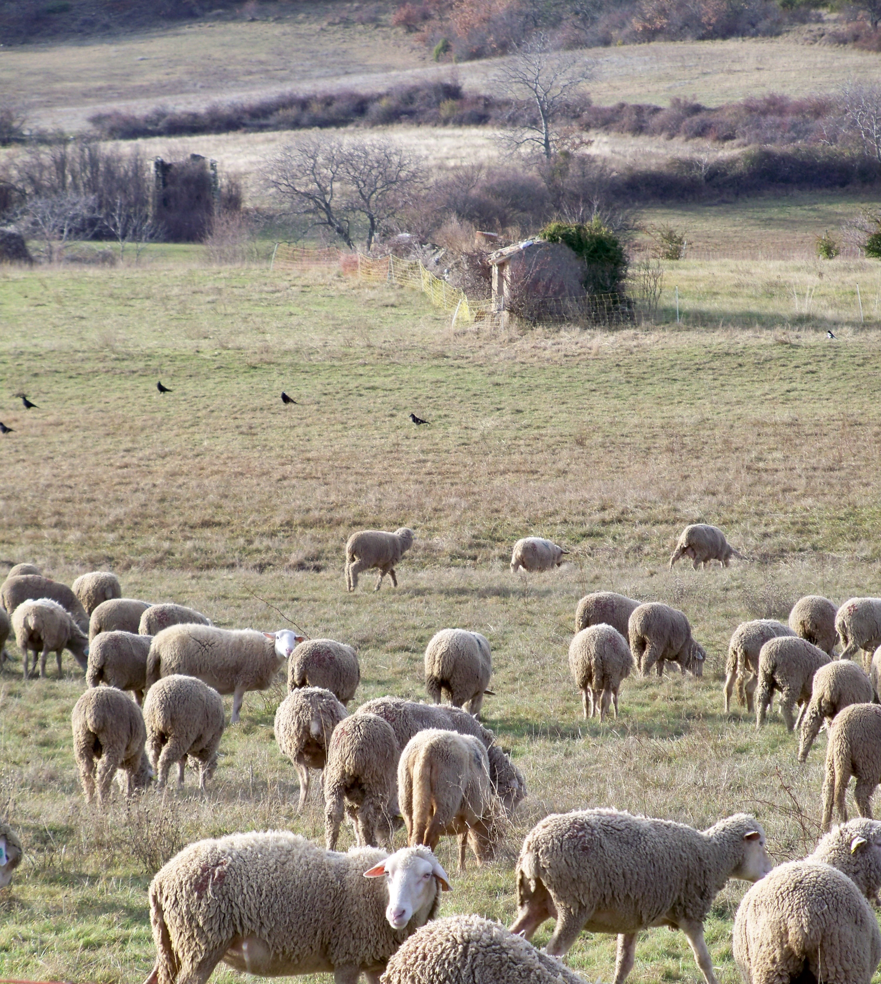 Cabanon et troupeau de mouton à Saumane (04) France